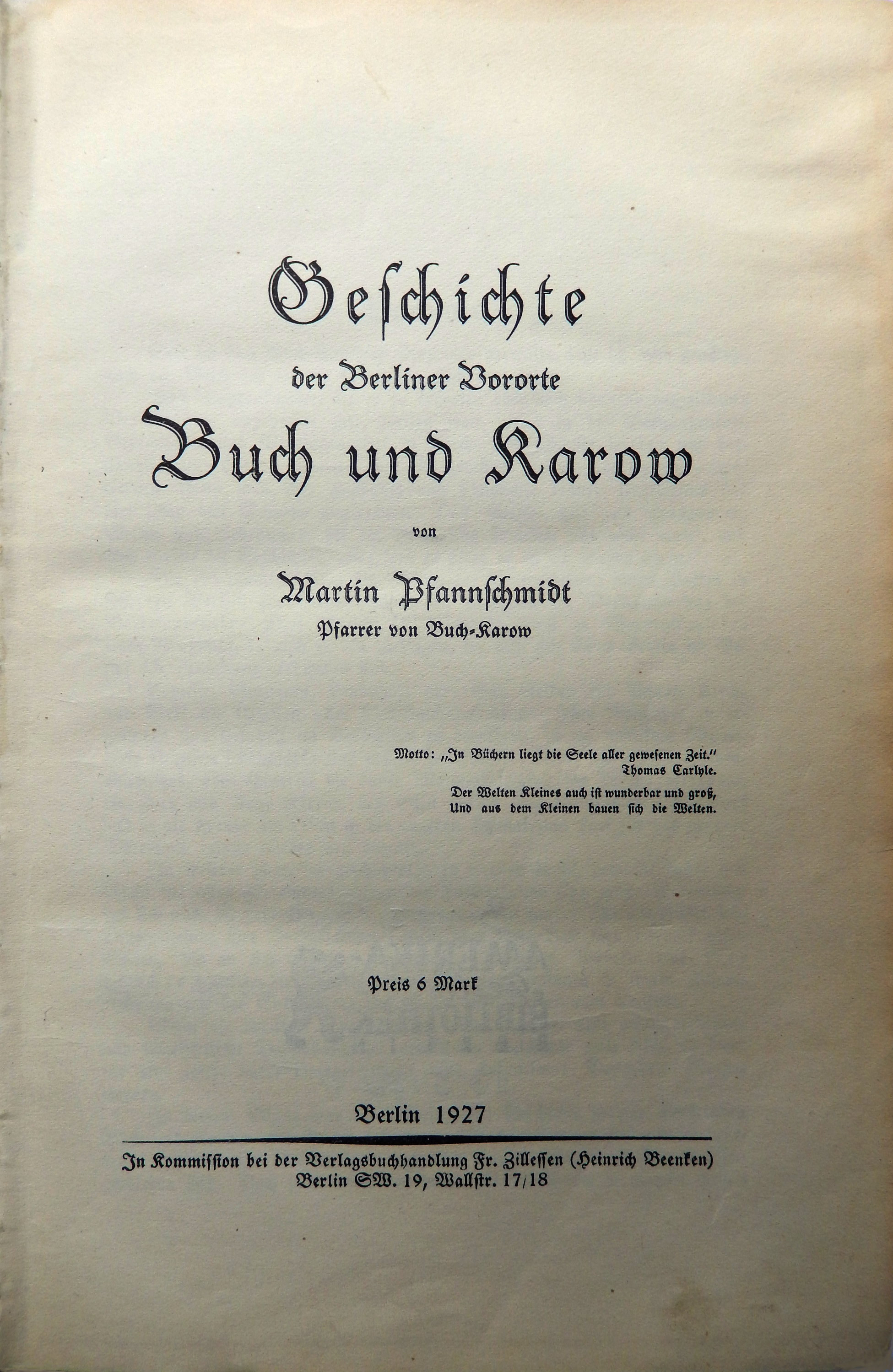 Martin Pfannschmidt: Geschichte der Berliner Vororte Berlin und Karow. Verlagsbuchhandlung Fr. Zillessen, Berlin Dezember 1927.